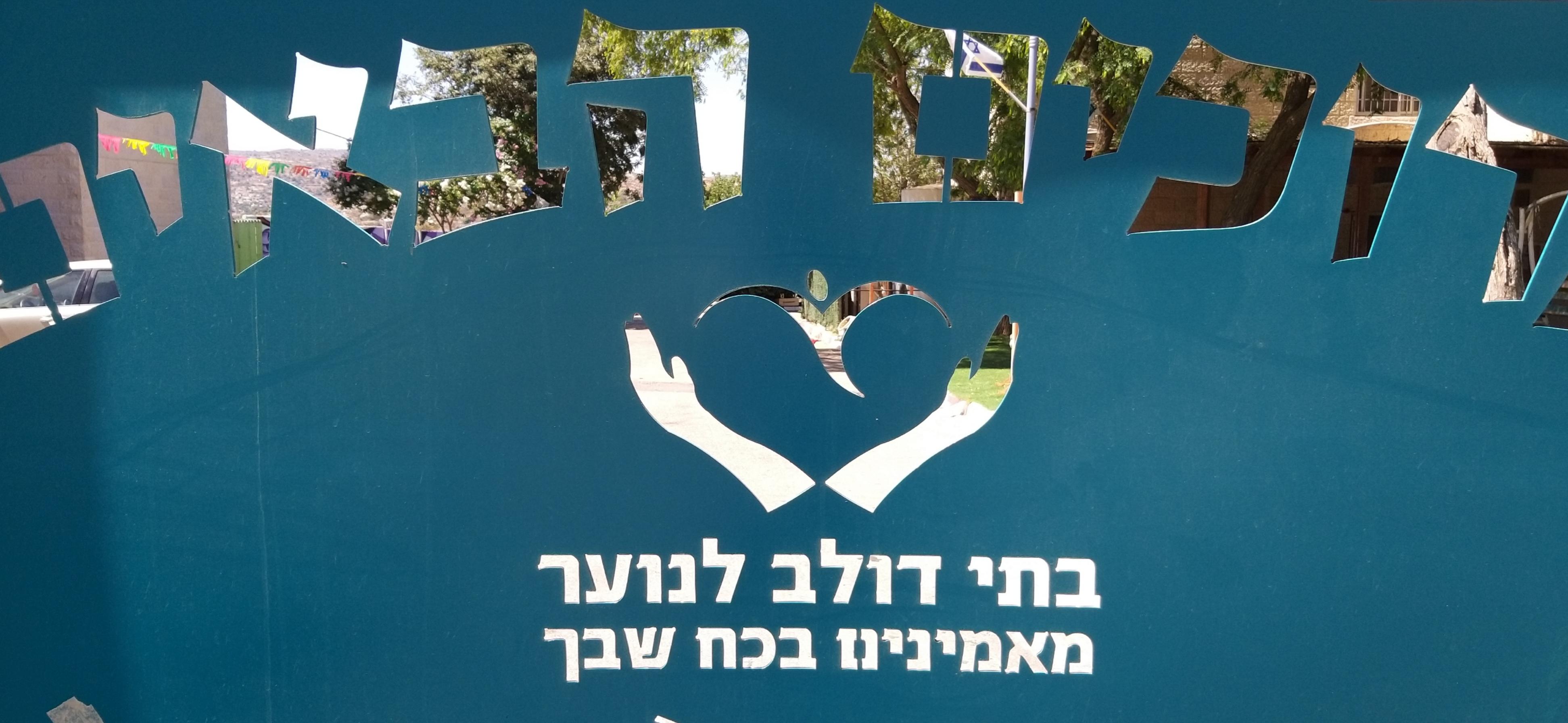 שער האולפנה